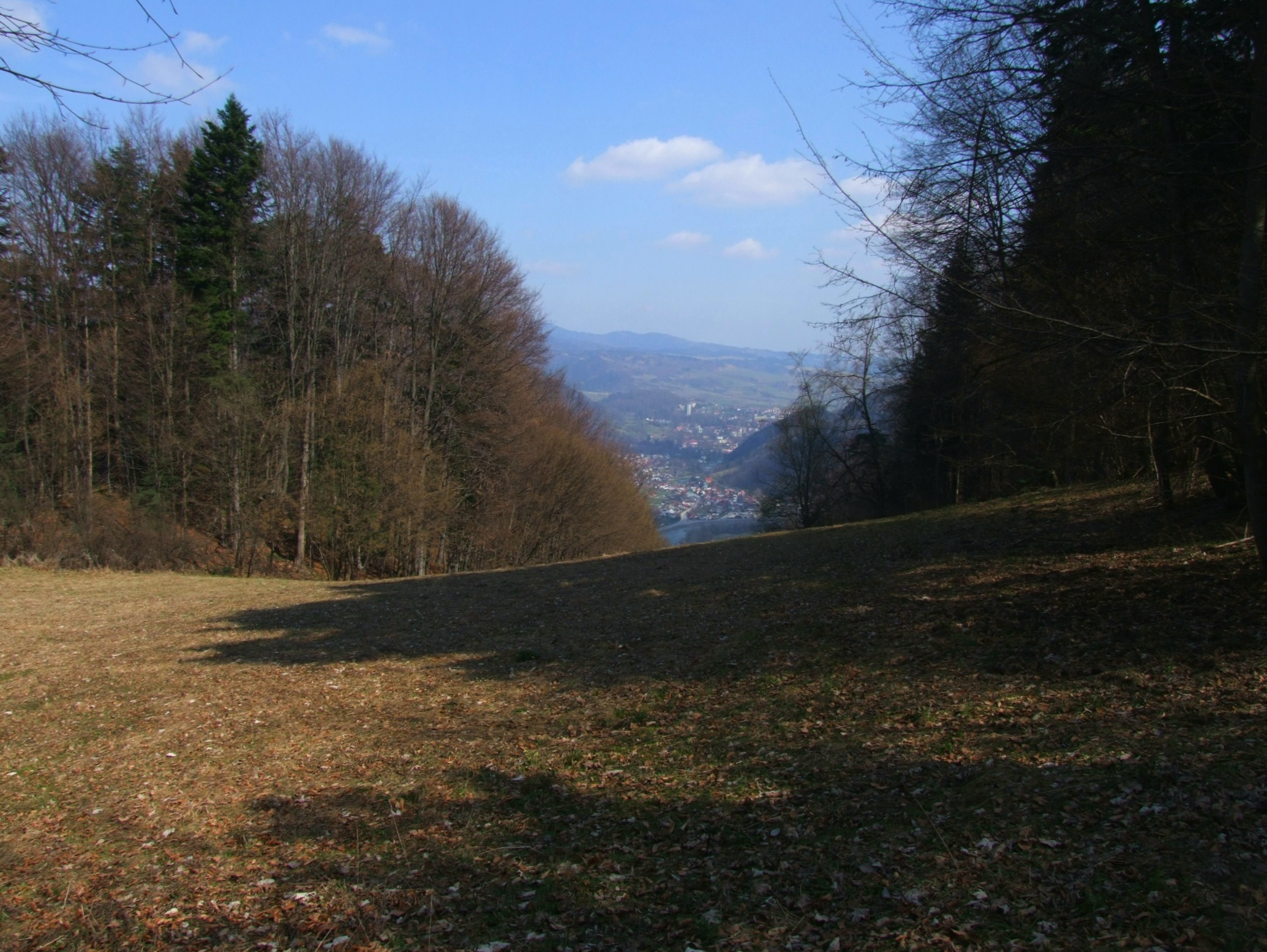 Widok z polany Burzana w Pieninach na Szczawnicę i Beskid Sądecki